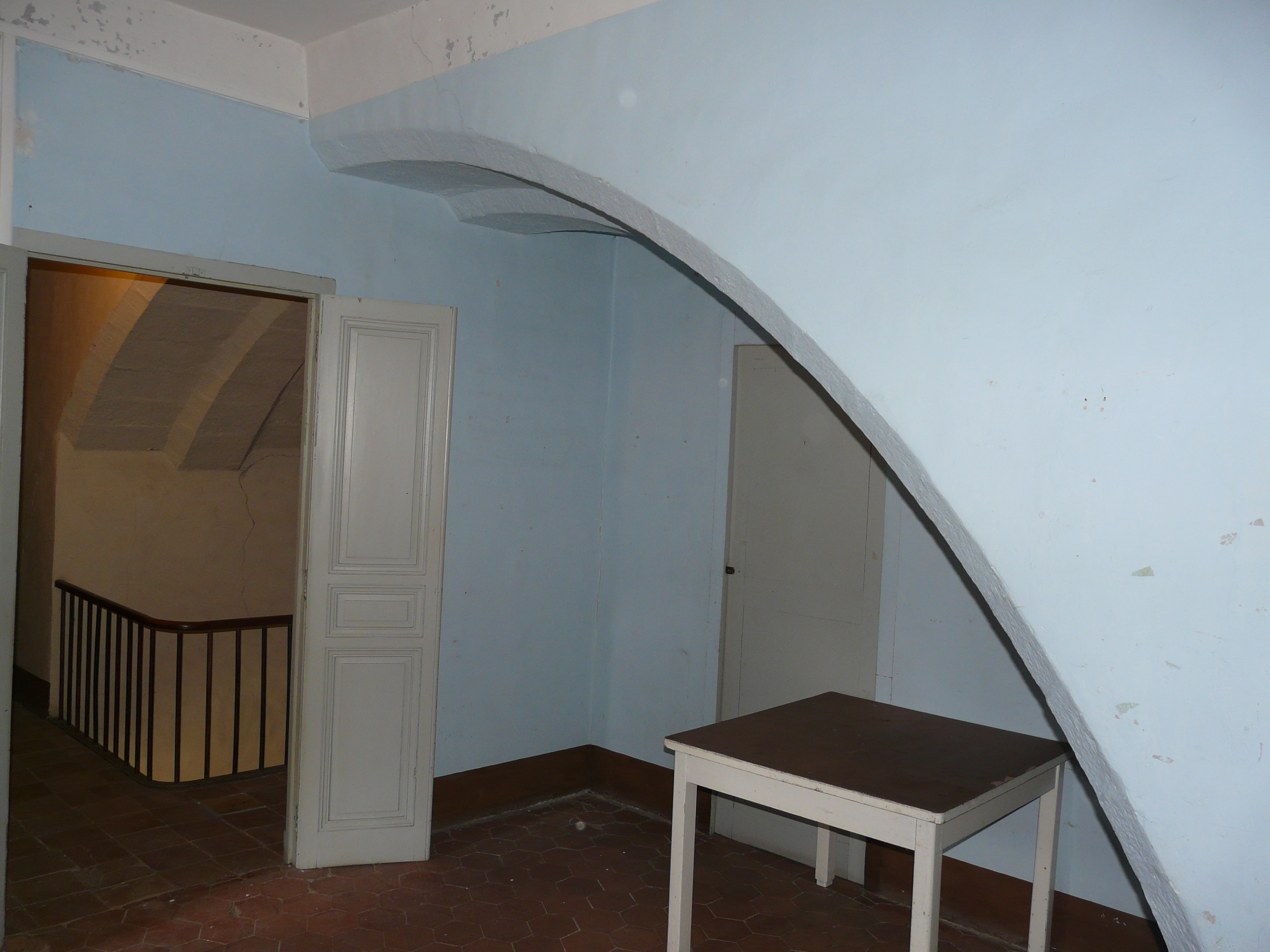 Antiga església de Santa Maria. Arc de comunicació de les naus